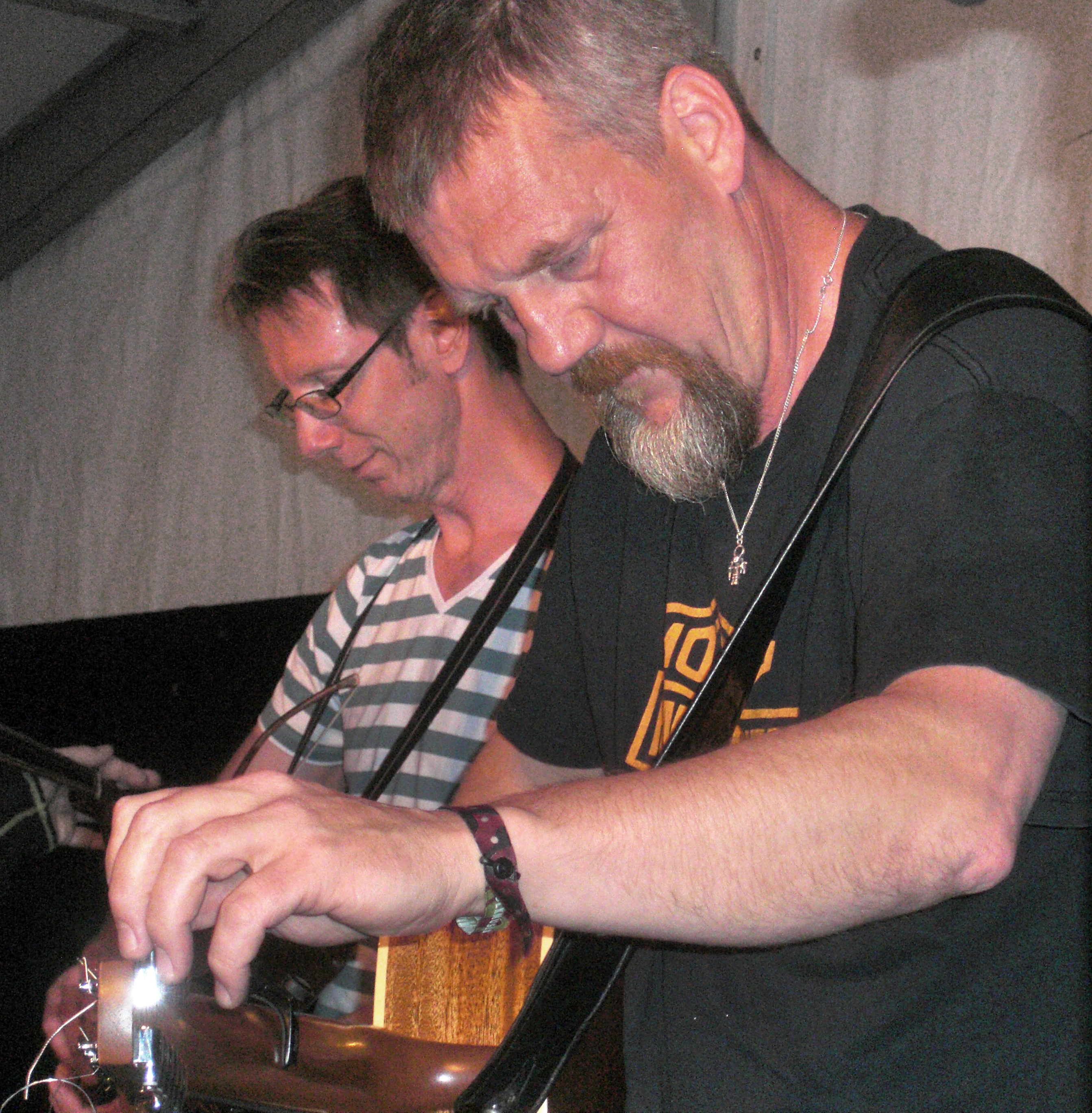 Roger Tallroth stämmer gitarren under ett spelning med folkmusikgruppen Väsen på Korrö folkmusikfestival 2010. Bakom honom ses riksspelmannen Olov Johansson.